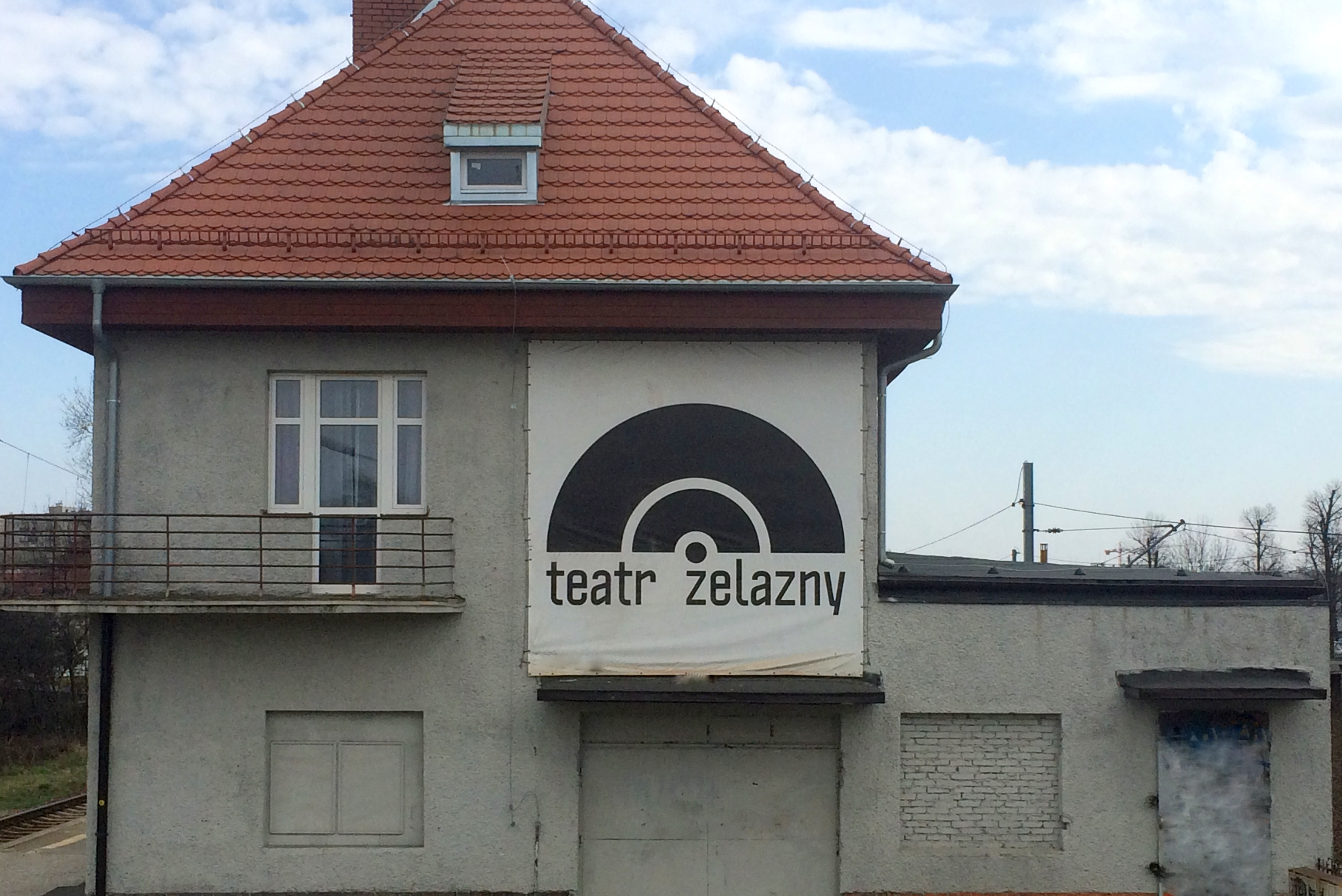 Teatr Żelazny